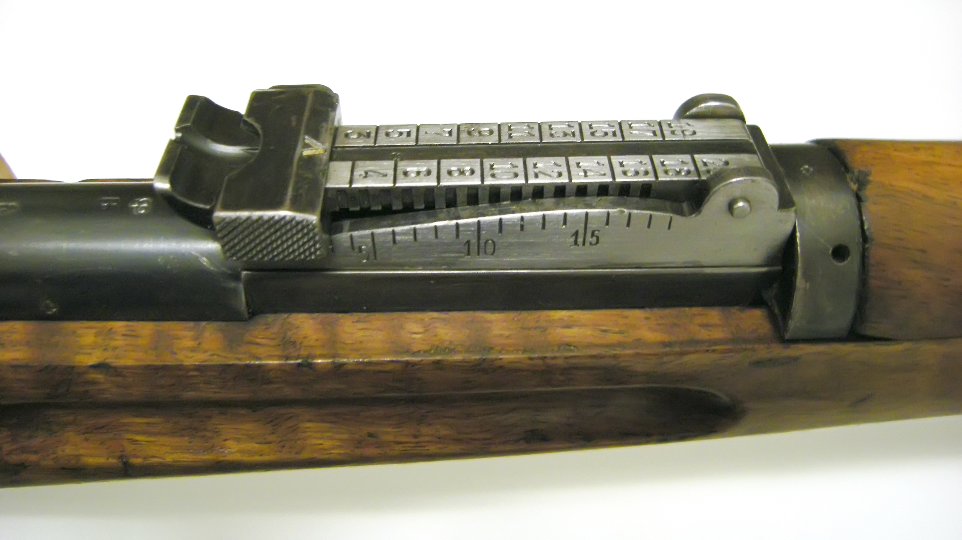 Hausse du fusil suisse d’infanterie 1911